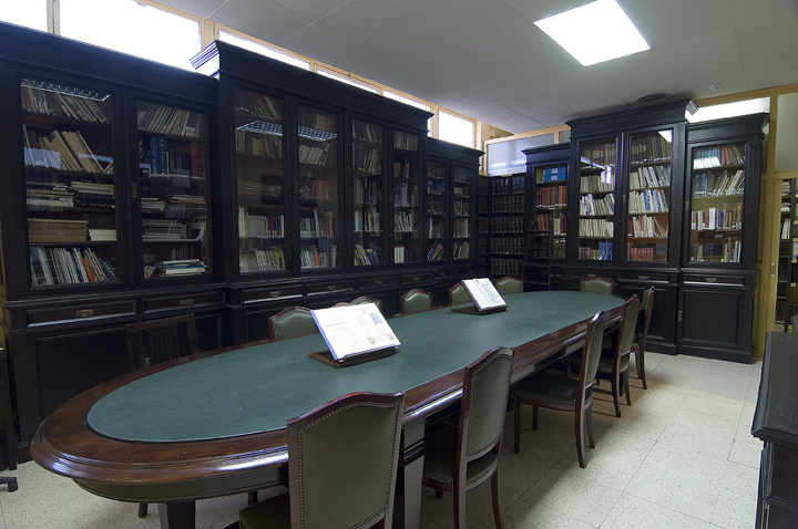 Biblioteca del Museu del Ferrocarril